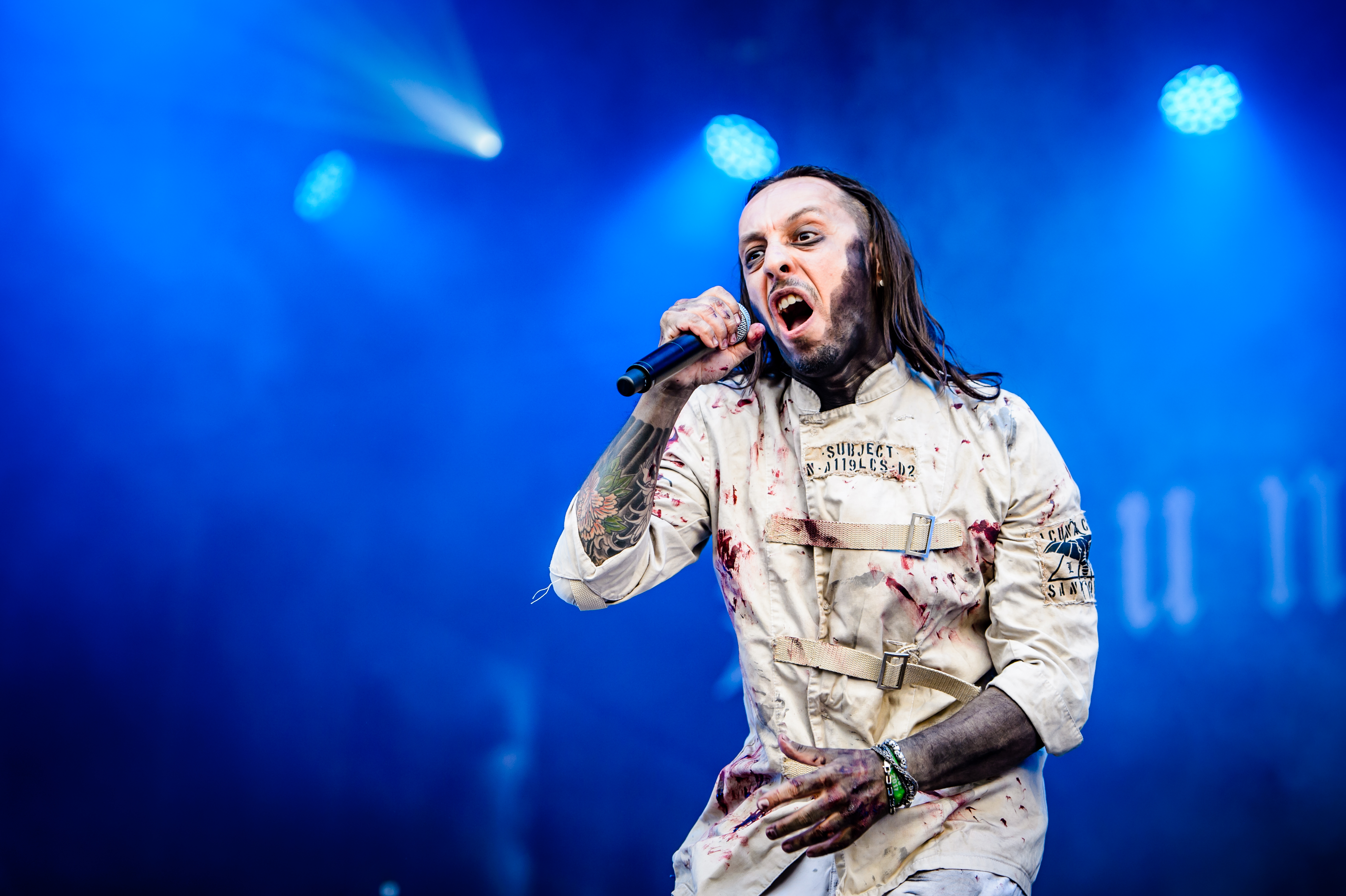 'RockHarz Open Air 2017; Ballenstedt': 'Lacuna Coil'